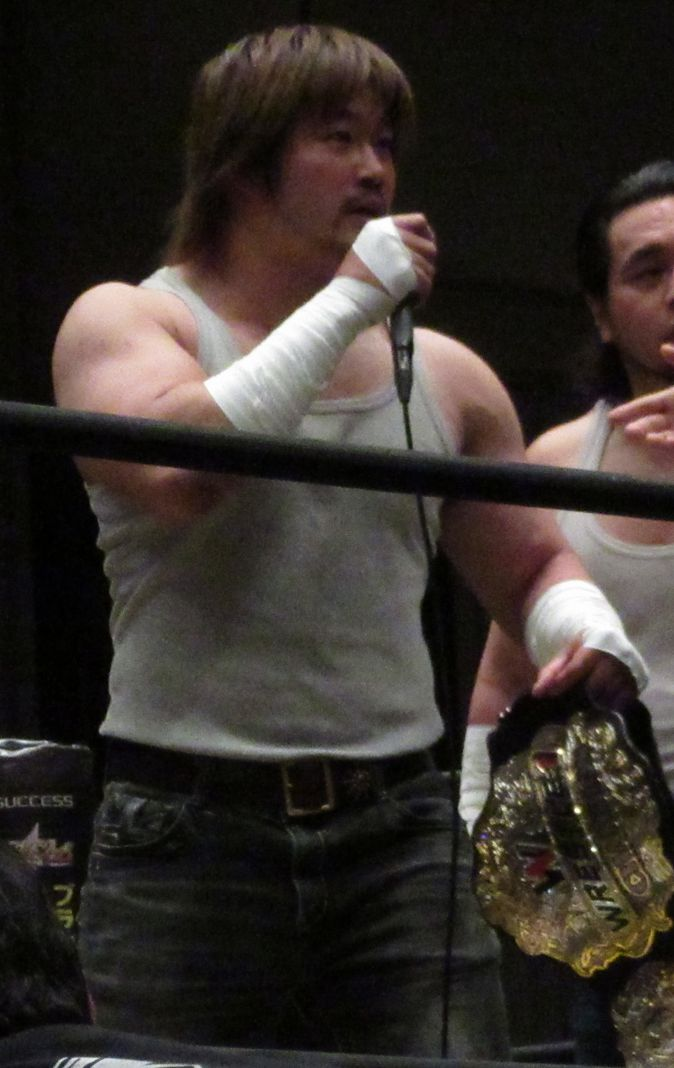 2016.5.29後楽園ホール